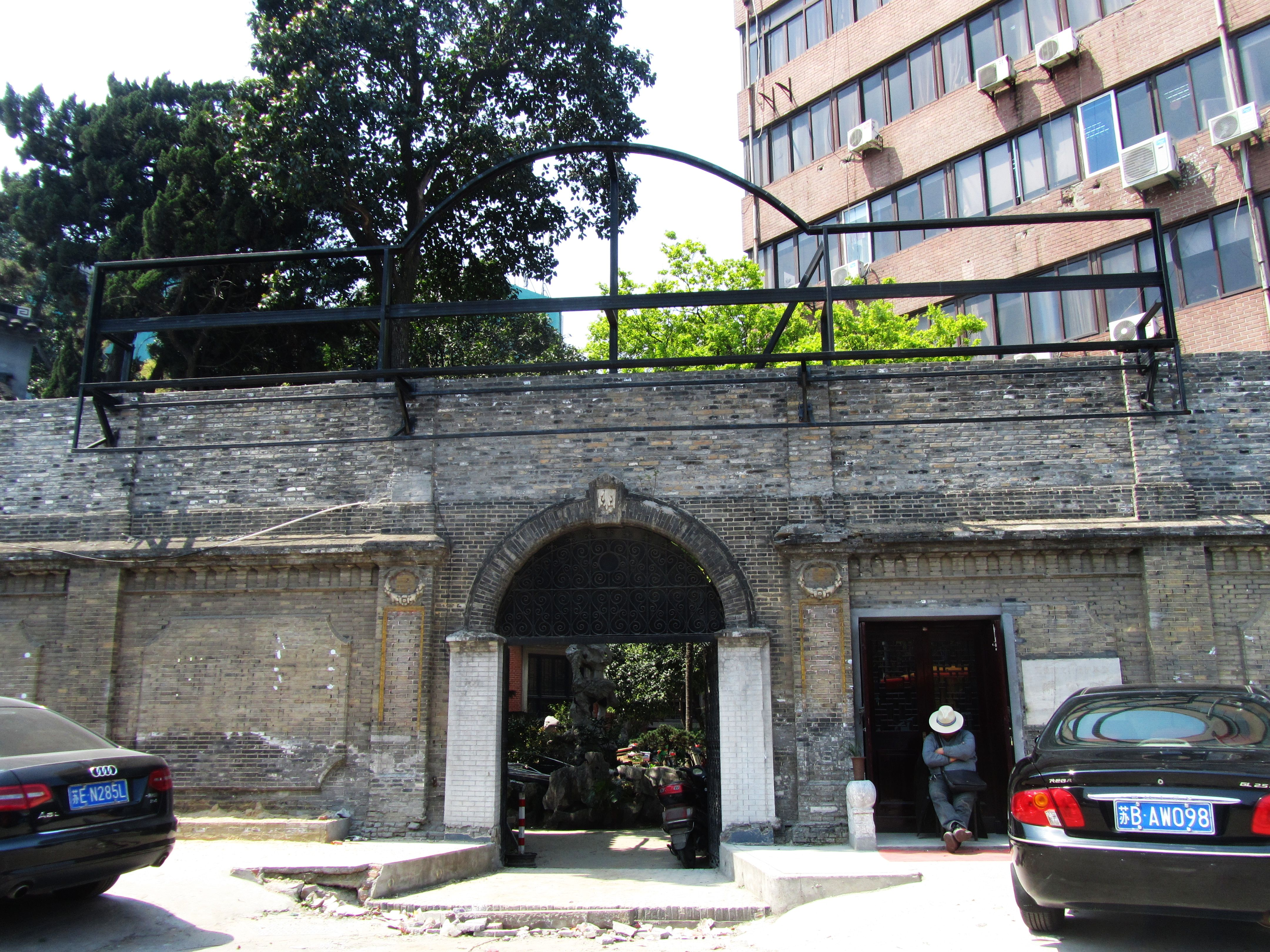 无锡缪公馆（缪斌故居），南大门。